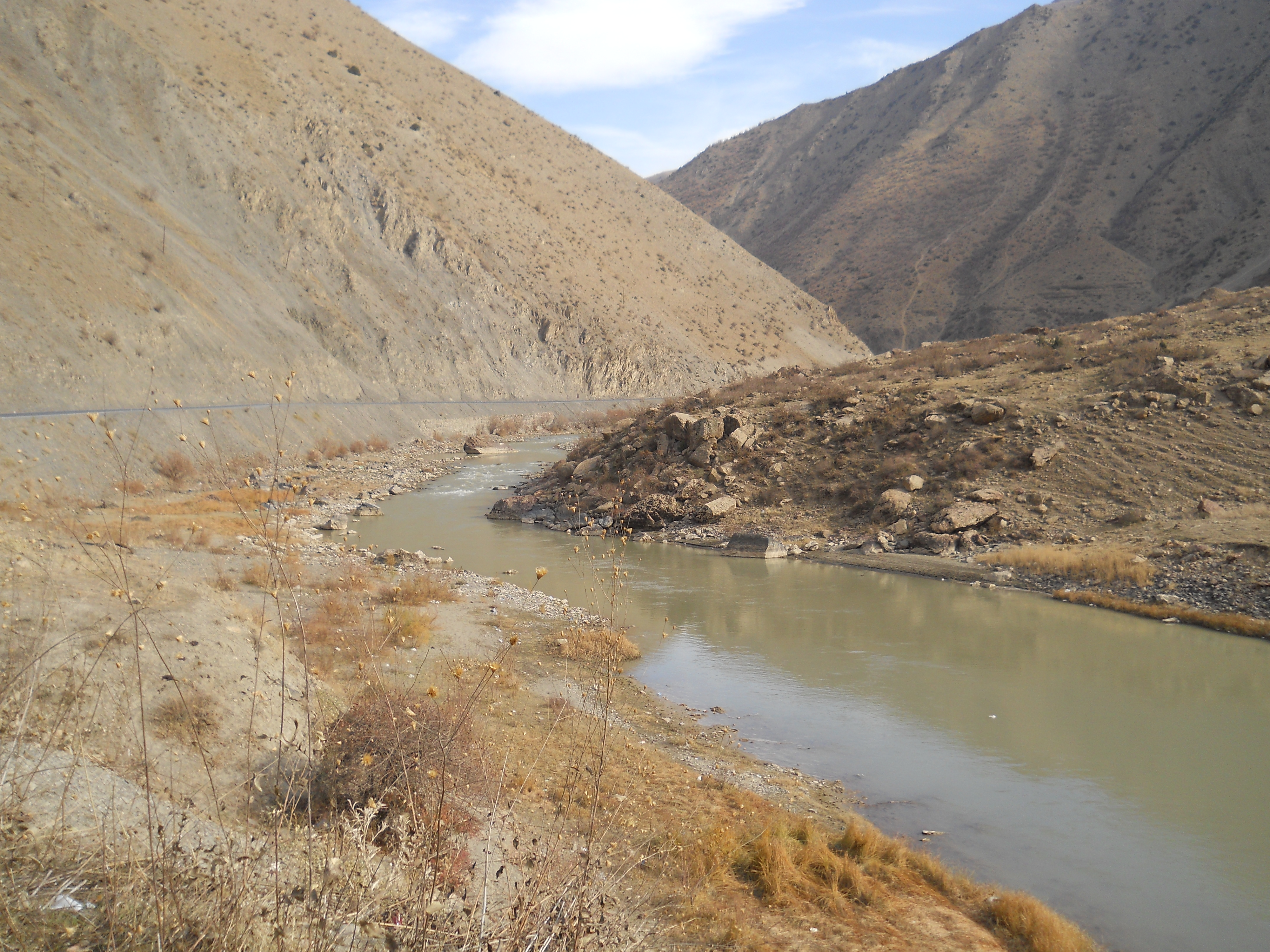 Zap Nehri